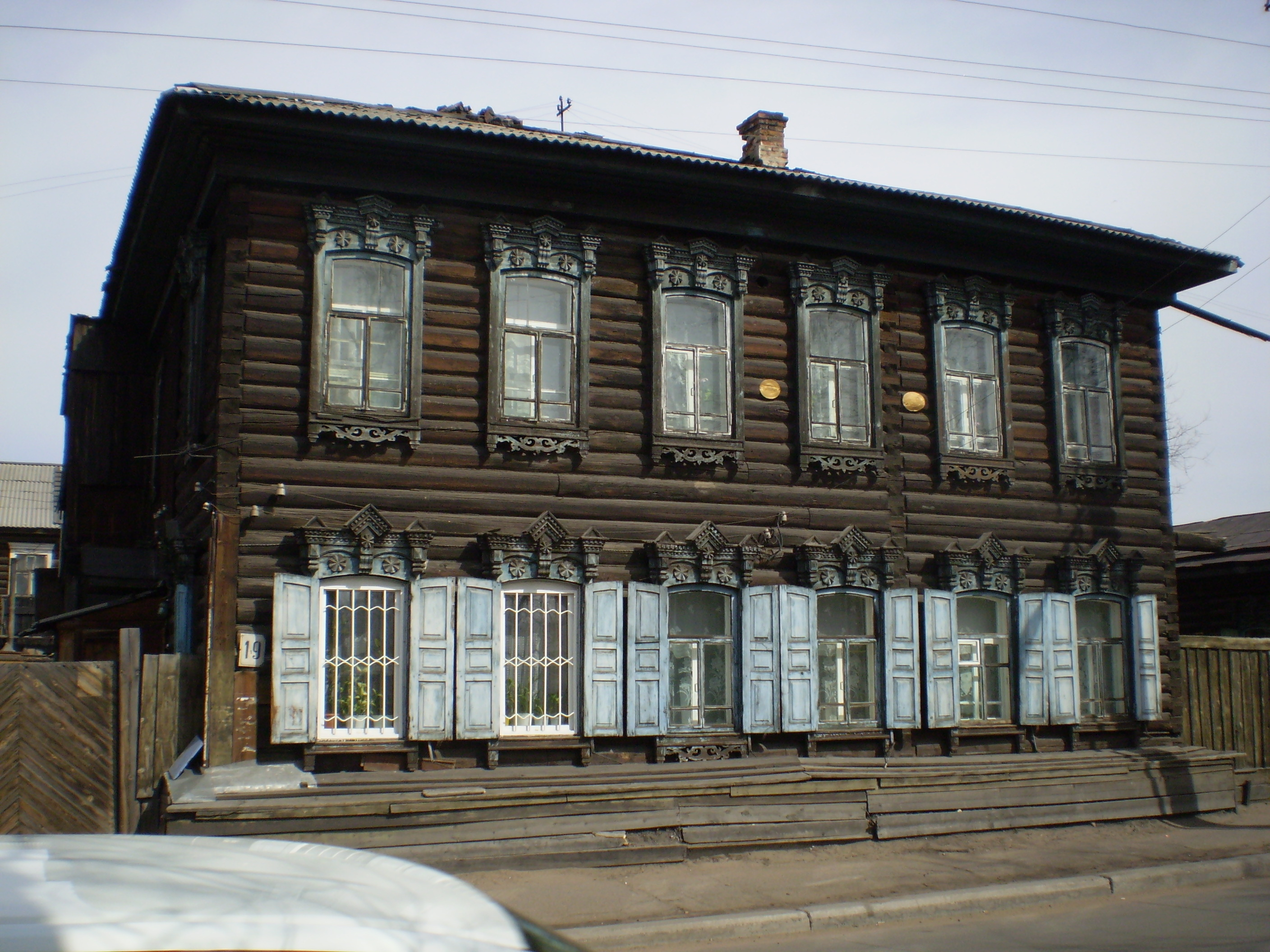 Ул. Банзарова 19. Усадьба М. Д. Мордовской. Памятник архитектуры.